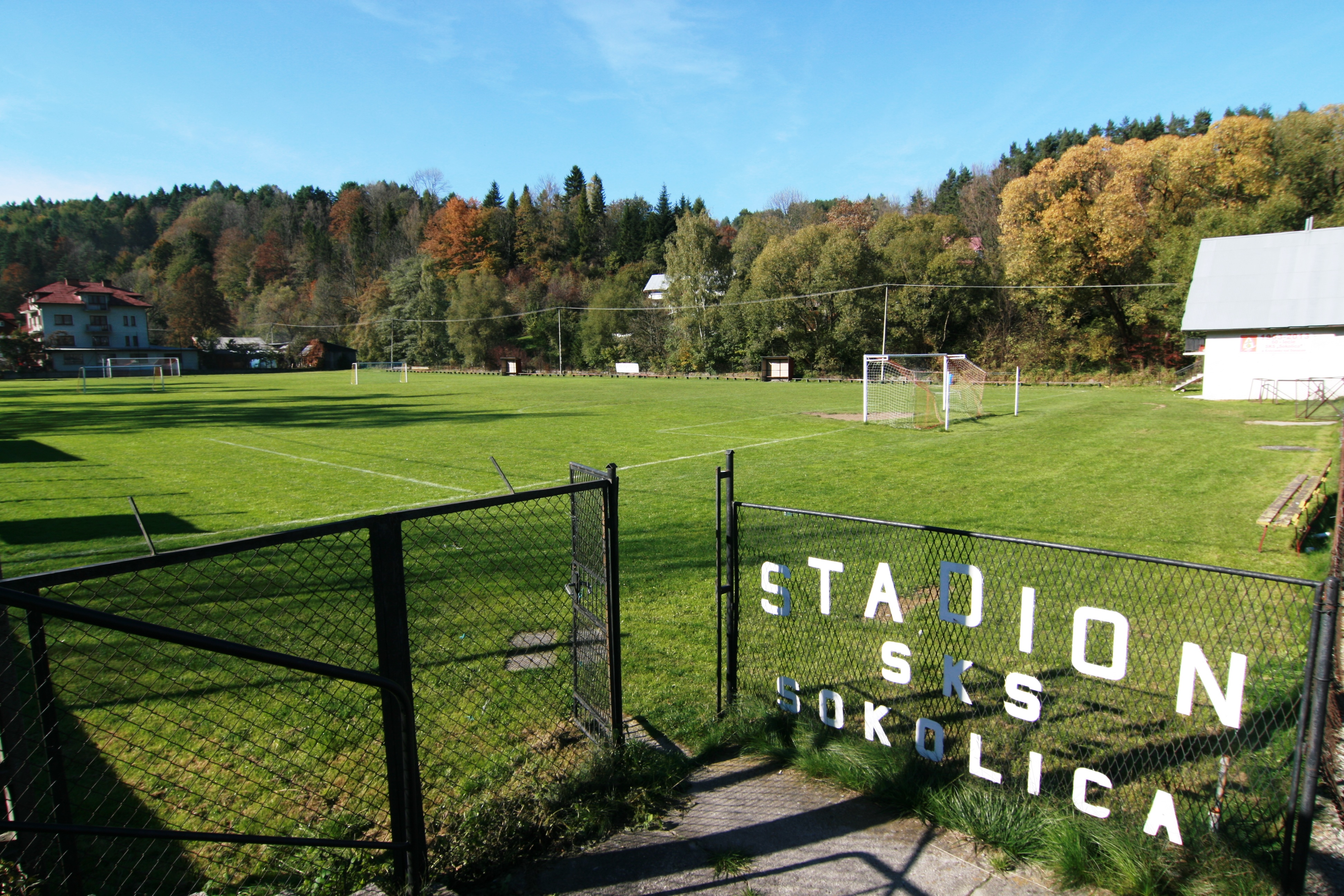 Stadion SKS Sokolica przy ul. Jagiellońskiej w Krościenku nad Dunajcem